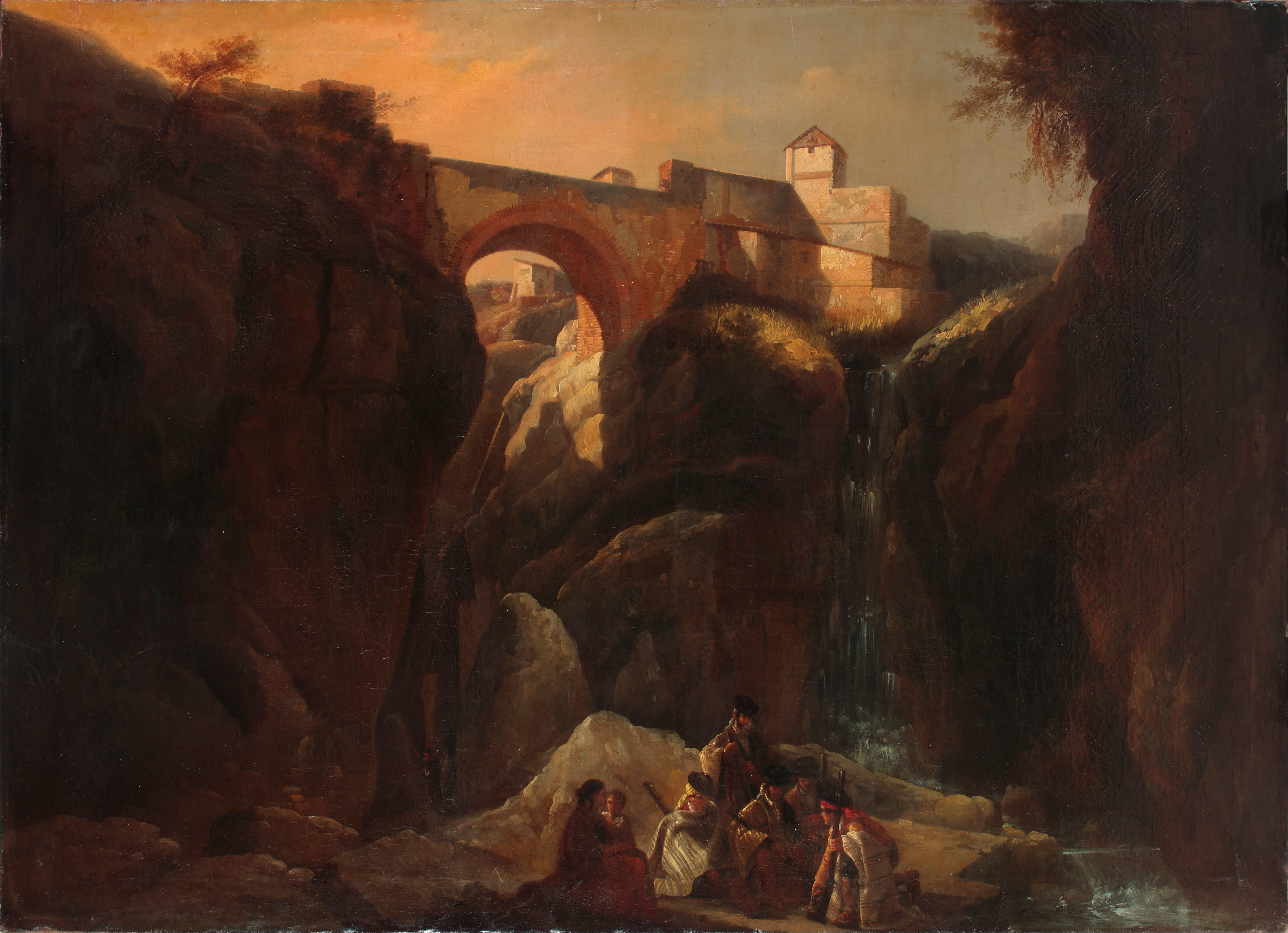 La obra representa a un grupo de contrabandistas operando en la Serranía de Ronda, que está situada en la provincia de Málaga, (Spain).